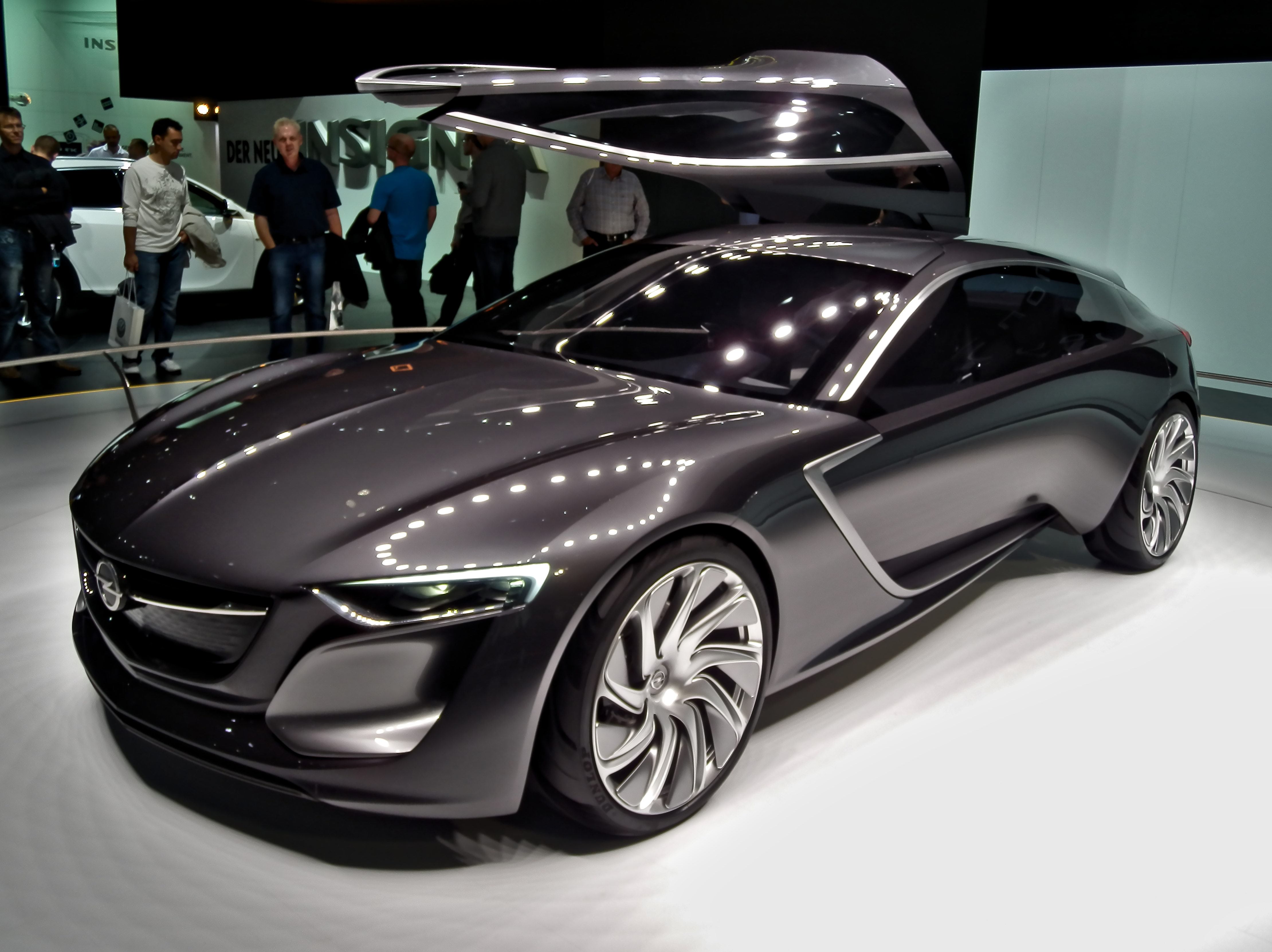 Opel Monza Concept Back at IAA 2013